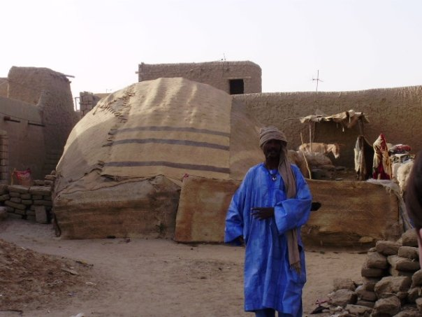 Habitant en tenue traditionnelle Touareg de Tombouctou This is an image of Cultural Fashion or Adornment from Mali